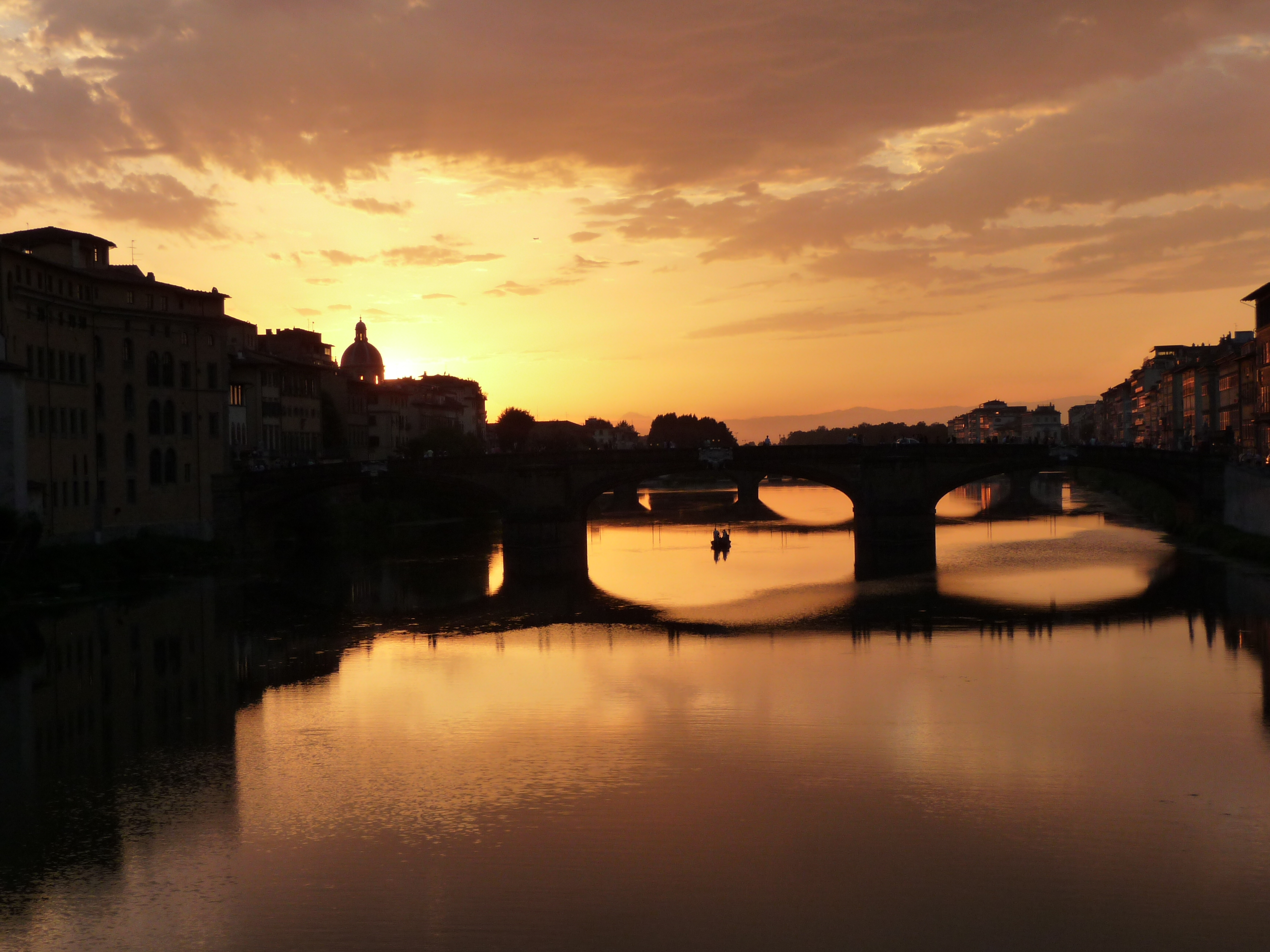 Ponte Santa Trinita e chiesa di San Frediano in Cestello (20 agosto 2010). This is a photo of a monument which is part of cultural heritage of Italy.